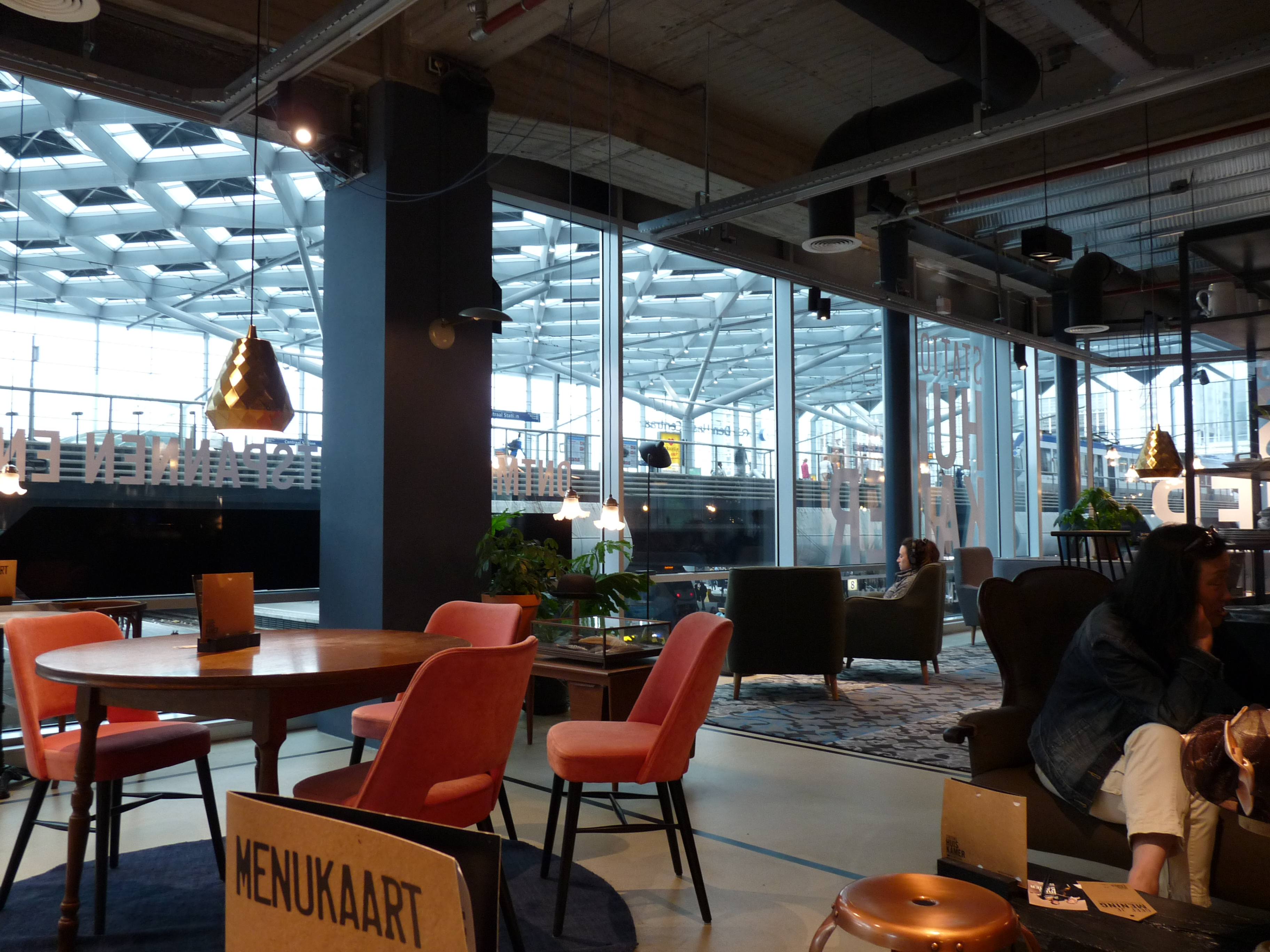 Stations Huiskamer op de eerste verdieping. Nieuw na renovatie kantoren complex CS